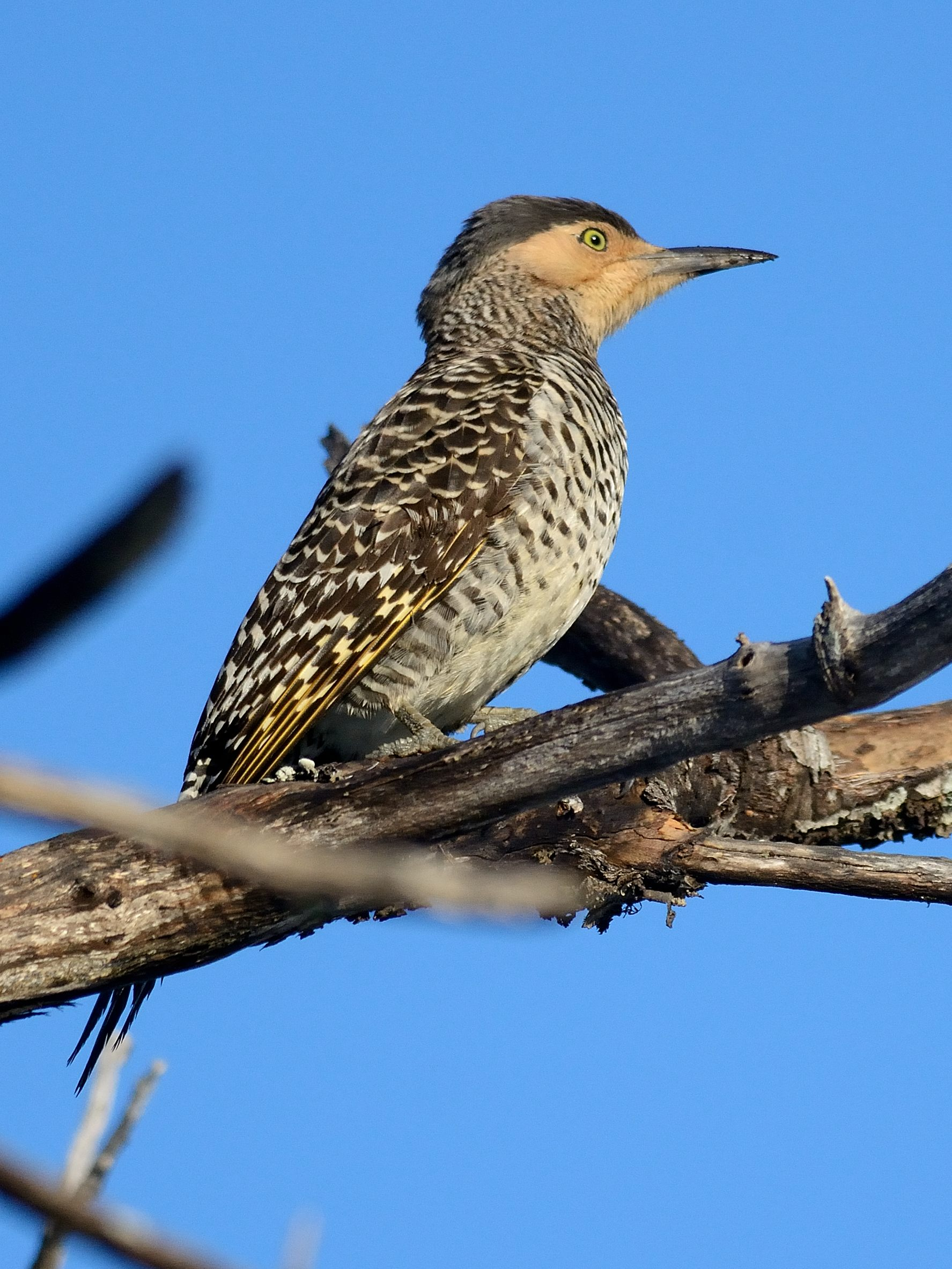 Pitío, Malalcahuello, Araucanía, Chile 19jul15